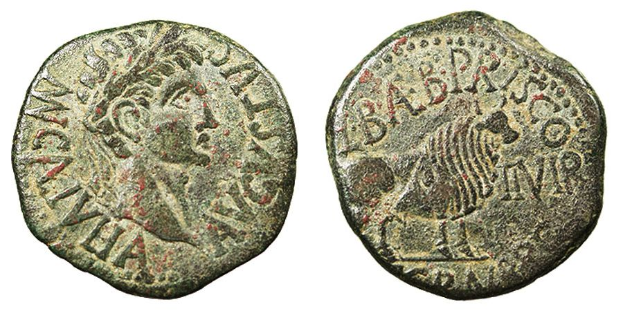 As de bronce acuñado en Calagurris, la actual Calahorra (provincia de La Rioja, España). En el anverso muestra una cabeza masculina laureada rodeada de la leyenda "MVN CAL IVLIA AVGVSTVS", abreviatura de "Municipium civium Romanorum Calagurris Nasica Julia - Augustus"; en el reverso, un toro y la leyenda "L BAEB PRISCO" "II VIR" "C GRAV BROC".